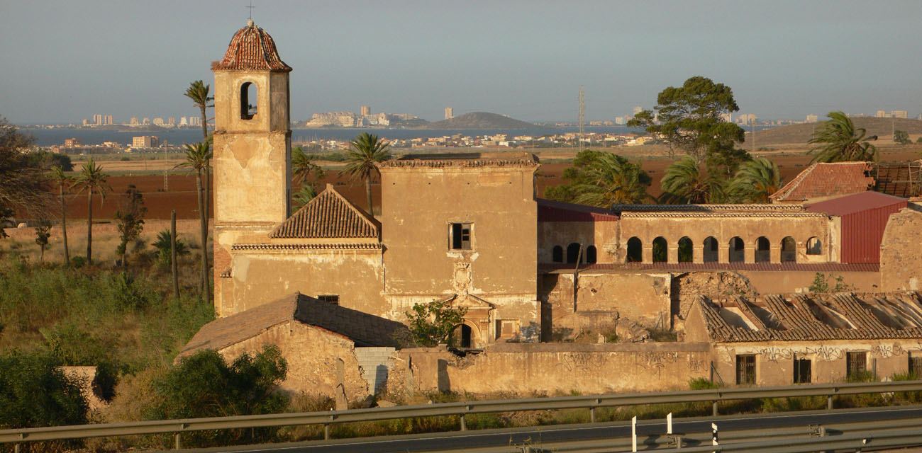 Monasterio de San Ginés de la Jara en ruinas en Cartagena (España)